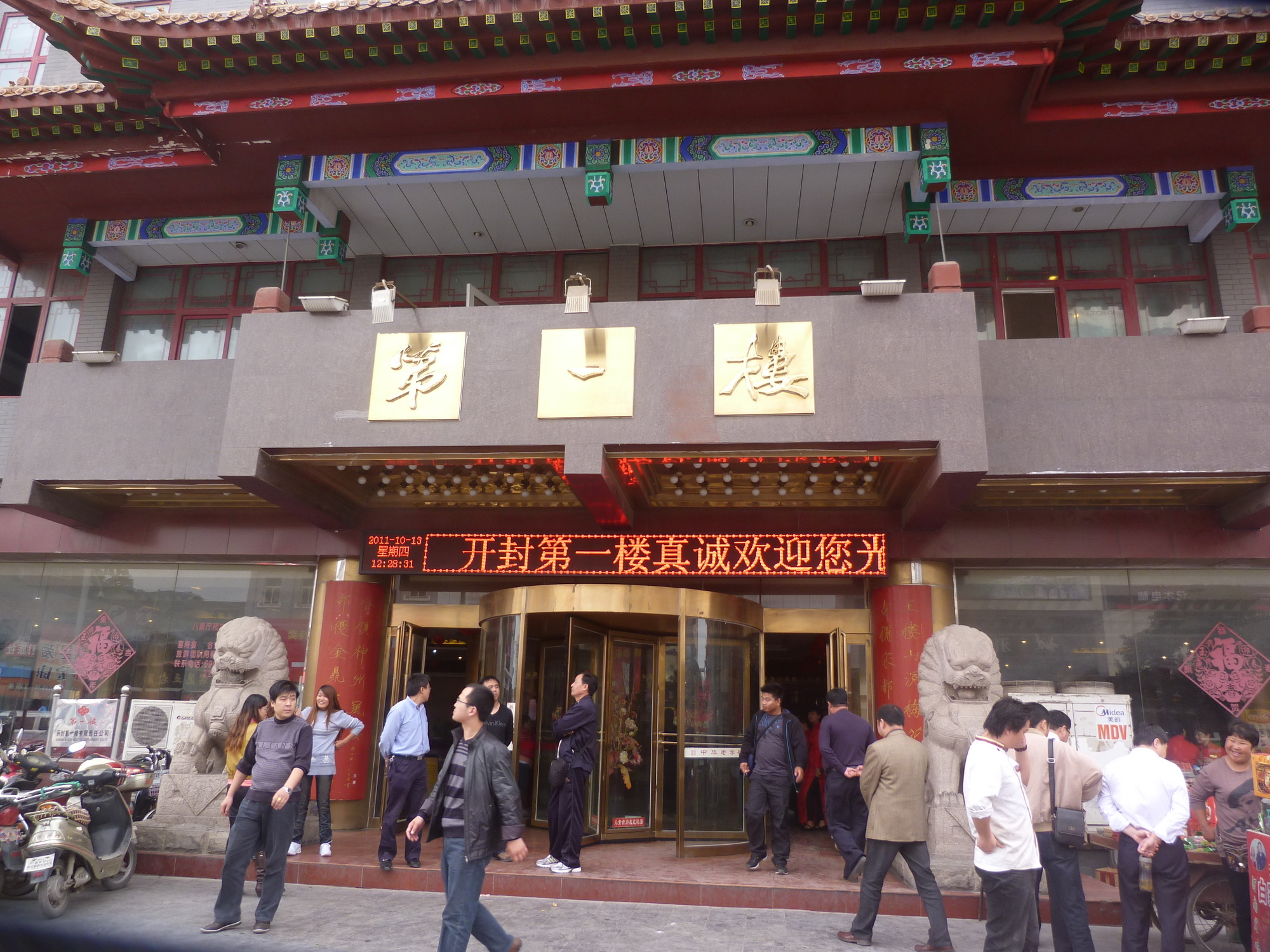 开封中华老字号第一楼饭店